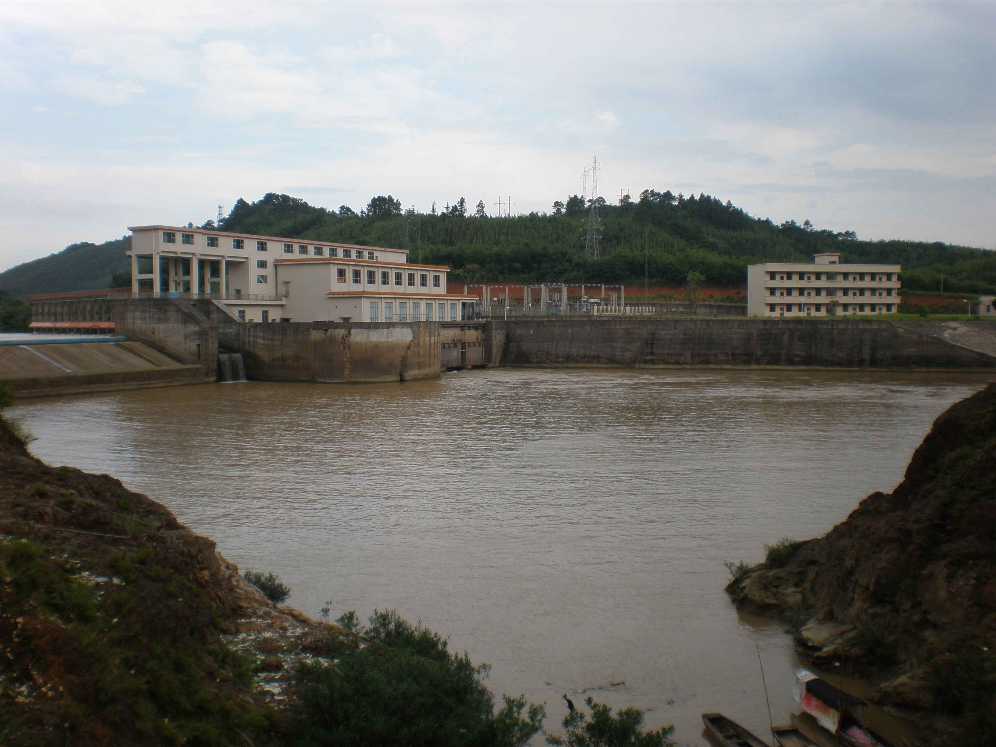 huaiji